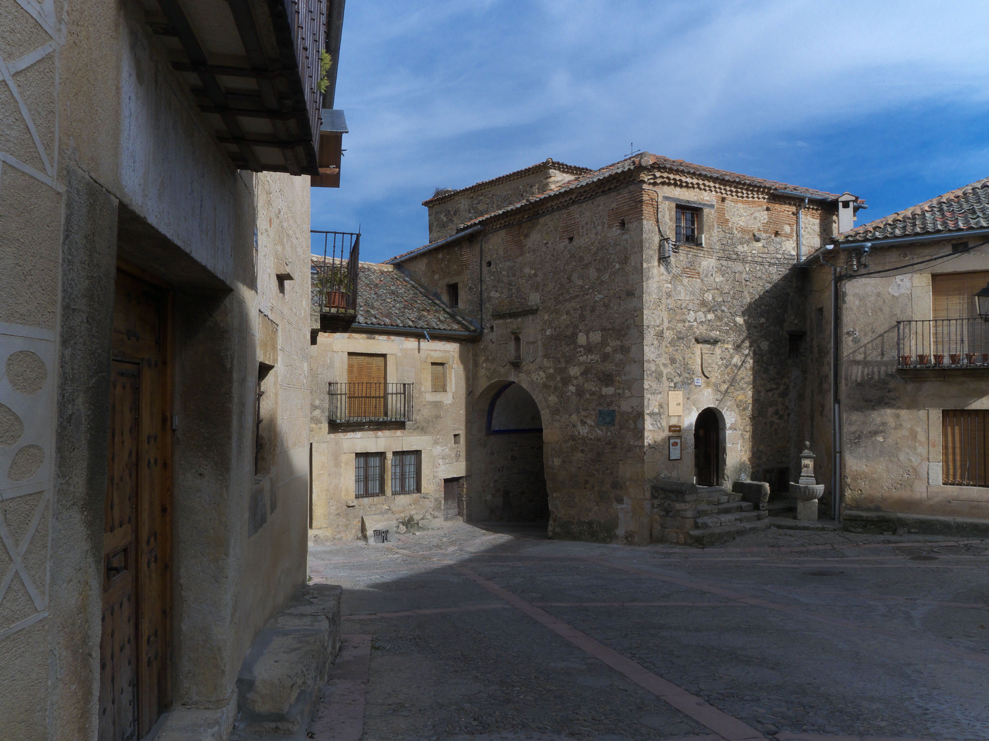 Sus orígenes en el siglo XIII